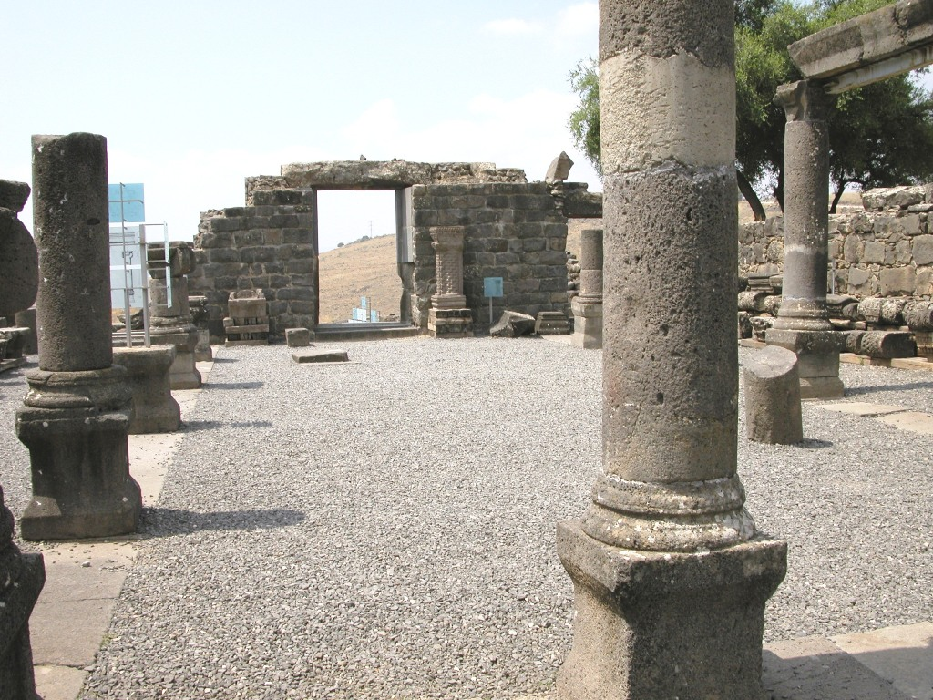 Old Synagogue in Korazim, Israel.